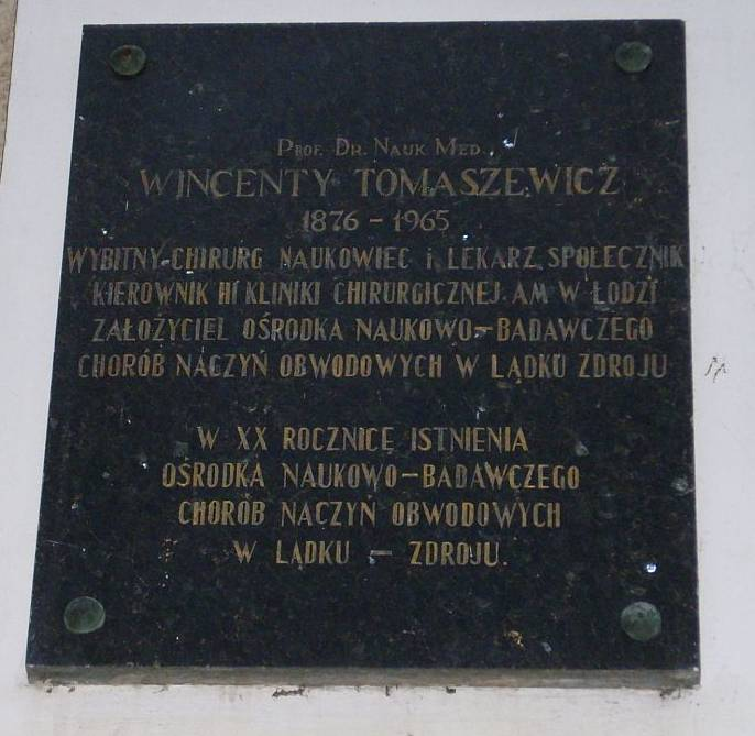 Tablica poświęcona Wincentemu Tomaszewiczowi na budynku Zakładu Przyrodoleczniczego „Wojciech”.